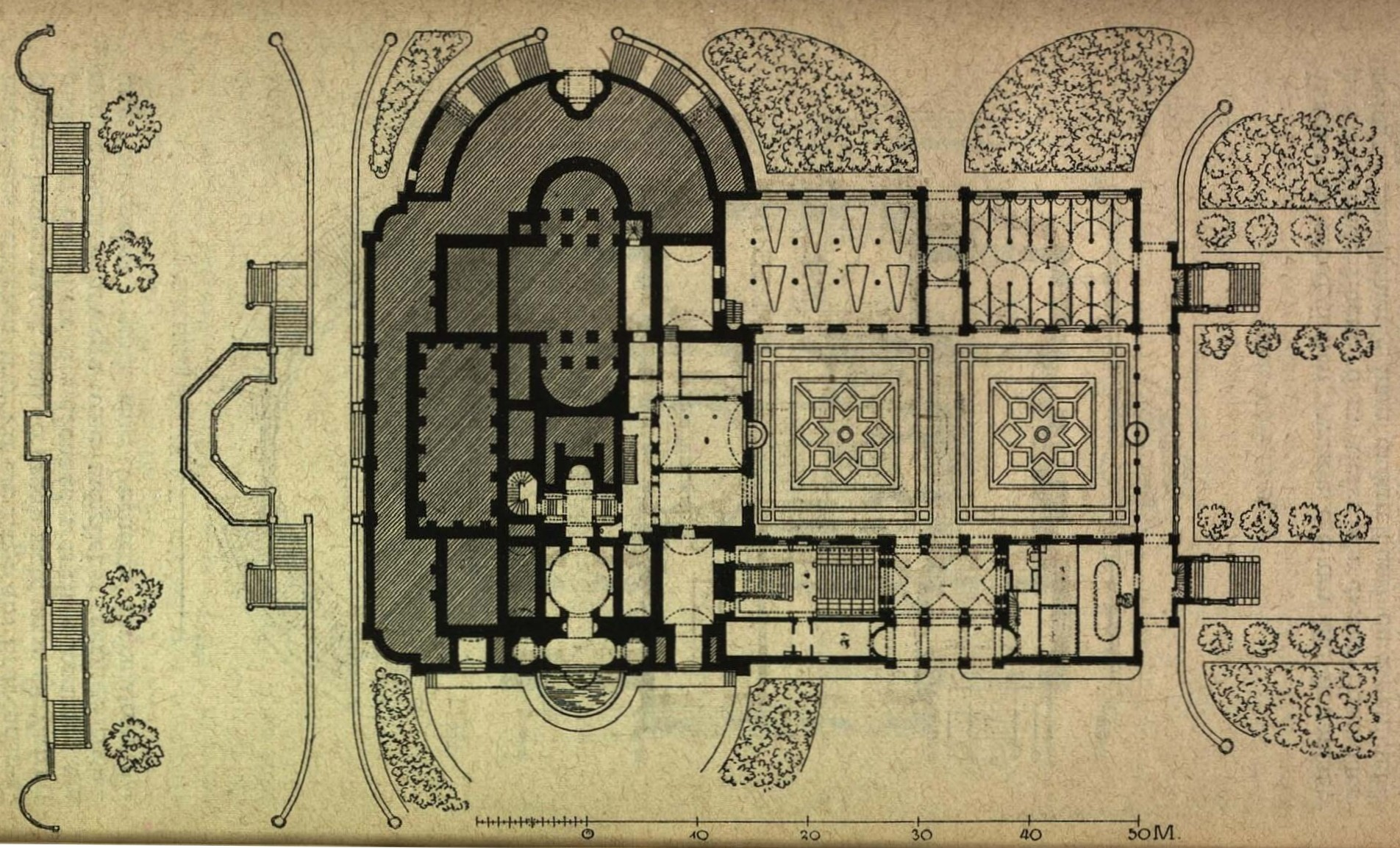 Christian Friedrich von Leins: Lageplan des Souterrains der Villa Berg in Stuttgart, um 1845. Norden liegt rechts.